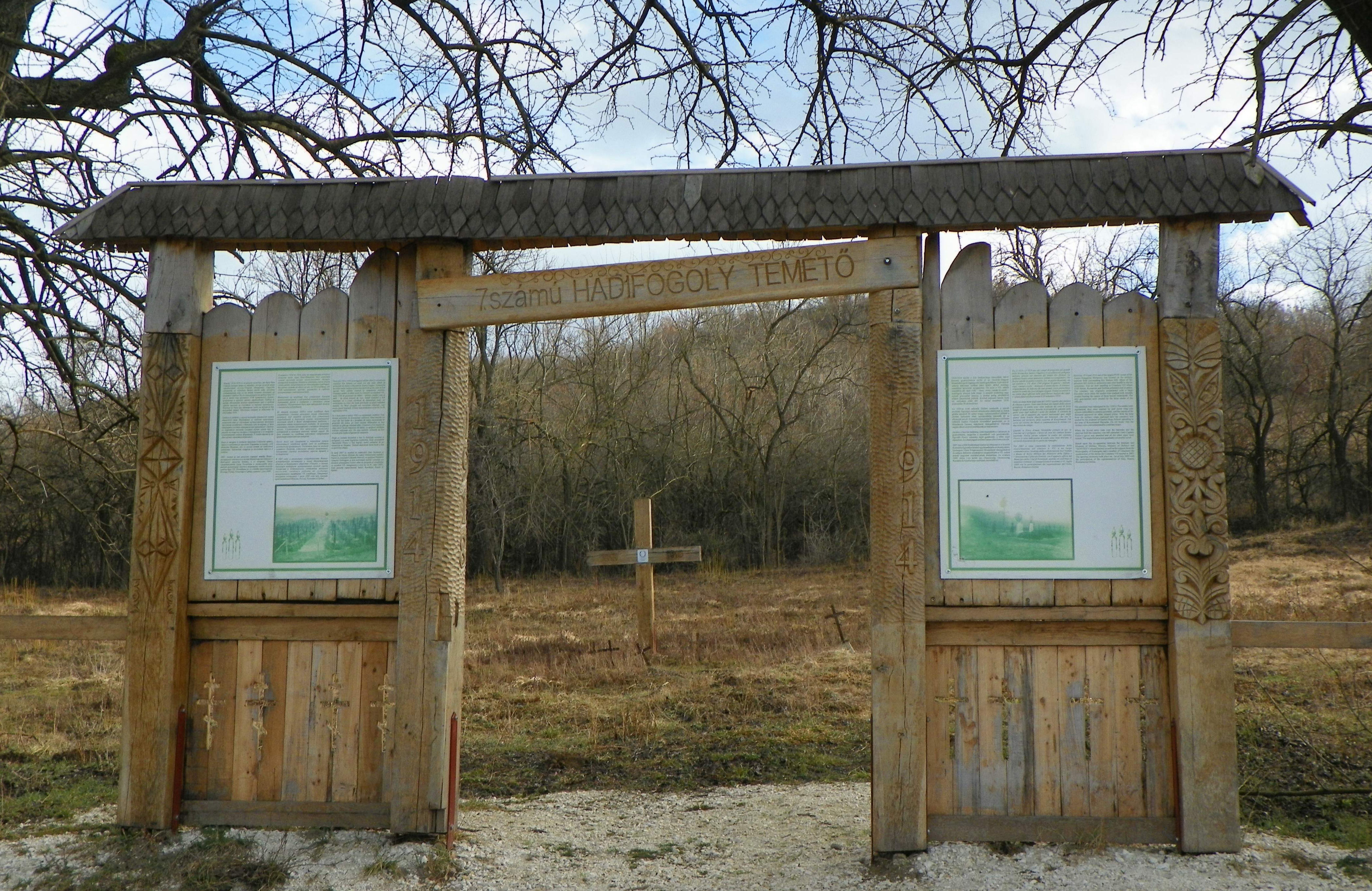 a 7-es hadifogoly temető bejárata a Strázsa-hegy mellett